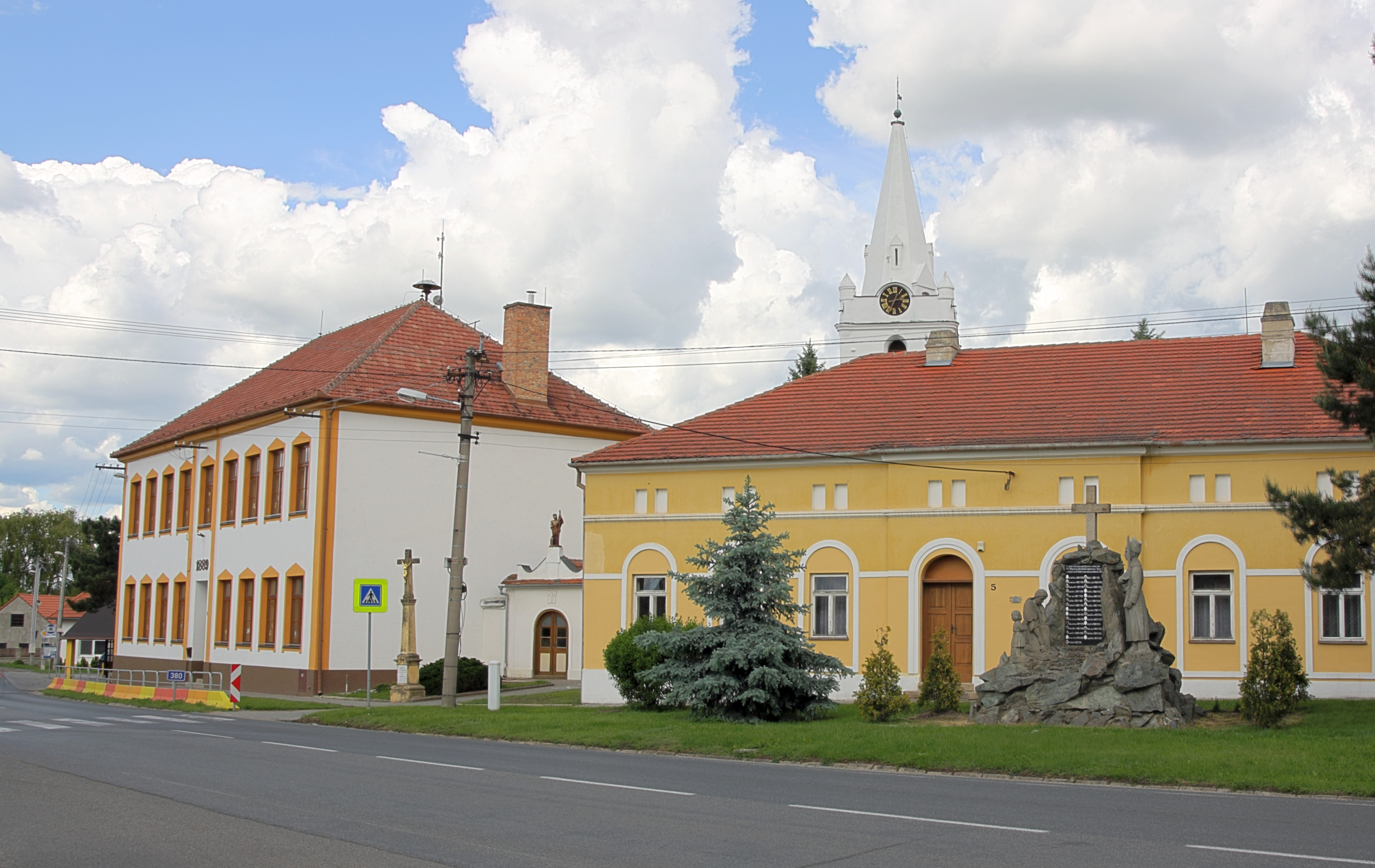 Telnice - škola a fara.